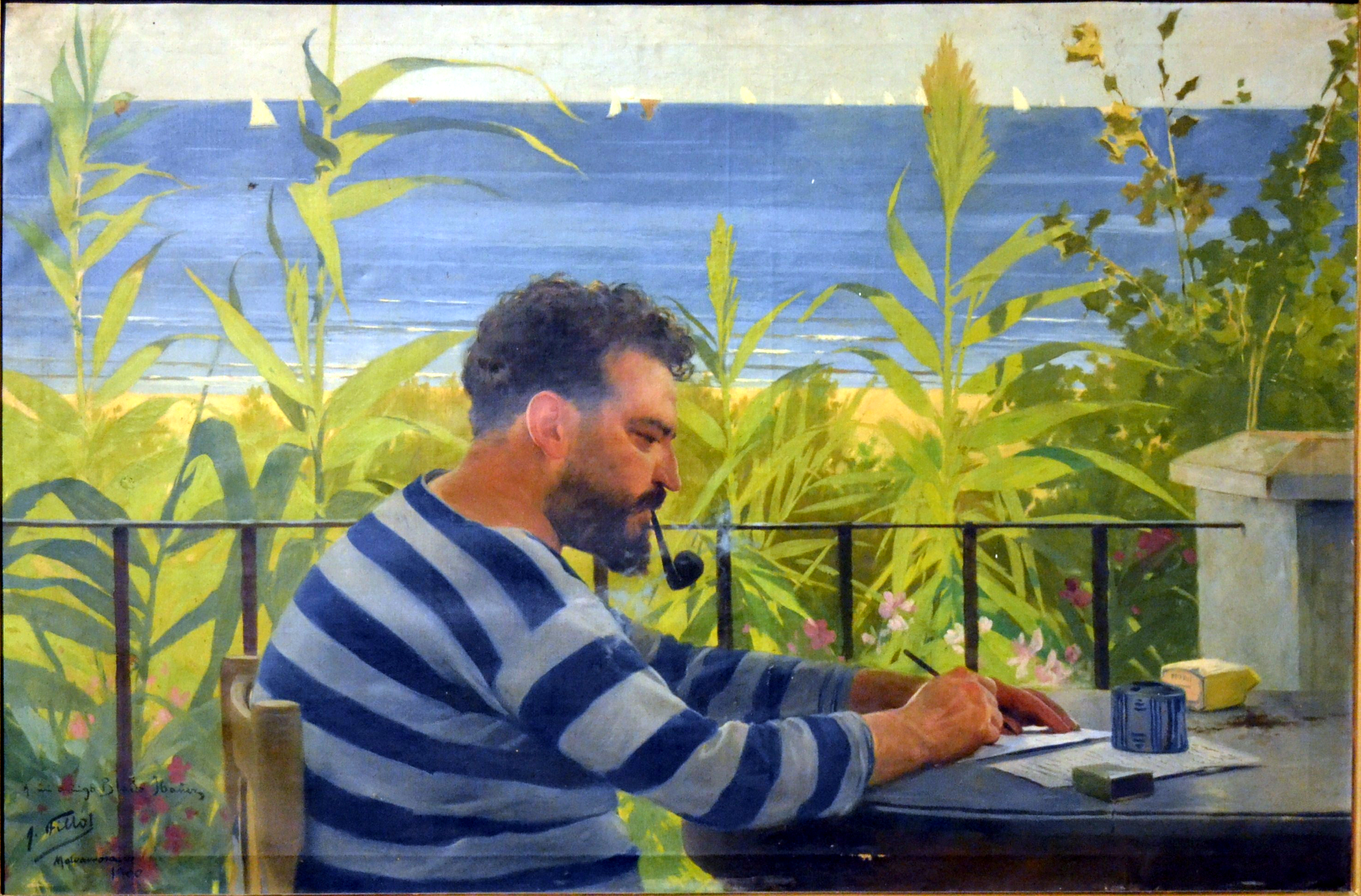 Retrat de Vicent Blasco Ibáñez, Antoni Fillol Granell, 1900. Col·lecció de la família Fillol, oli sobre tela.